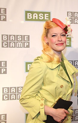 Enie van de Meiklokjes mit Begleitung bei der Eroeffnung des neuen -Base-camp - in den Kaiserhoefen Unter den Linden -in Berlin